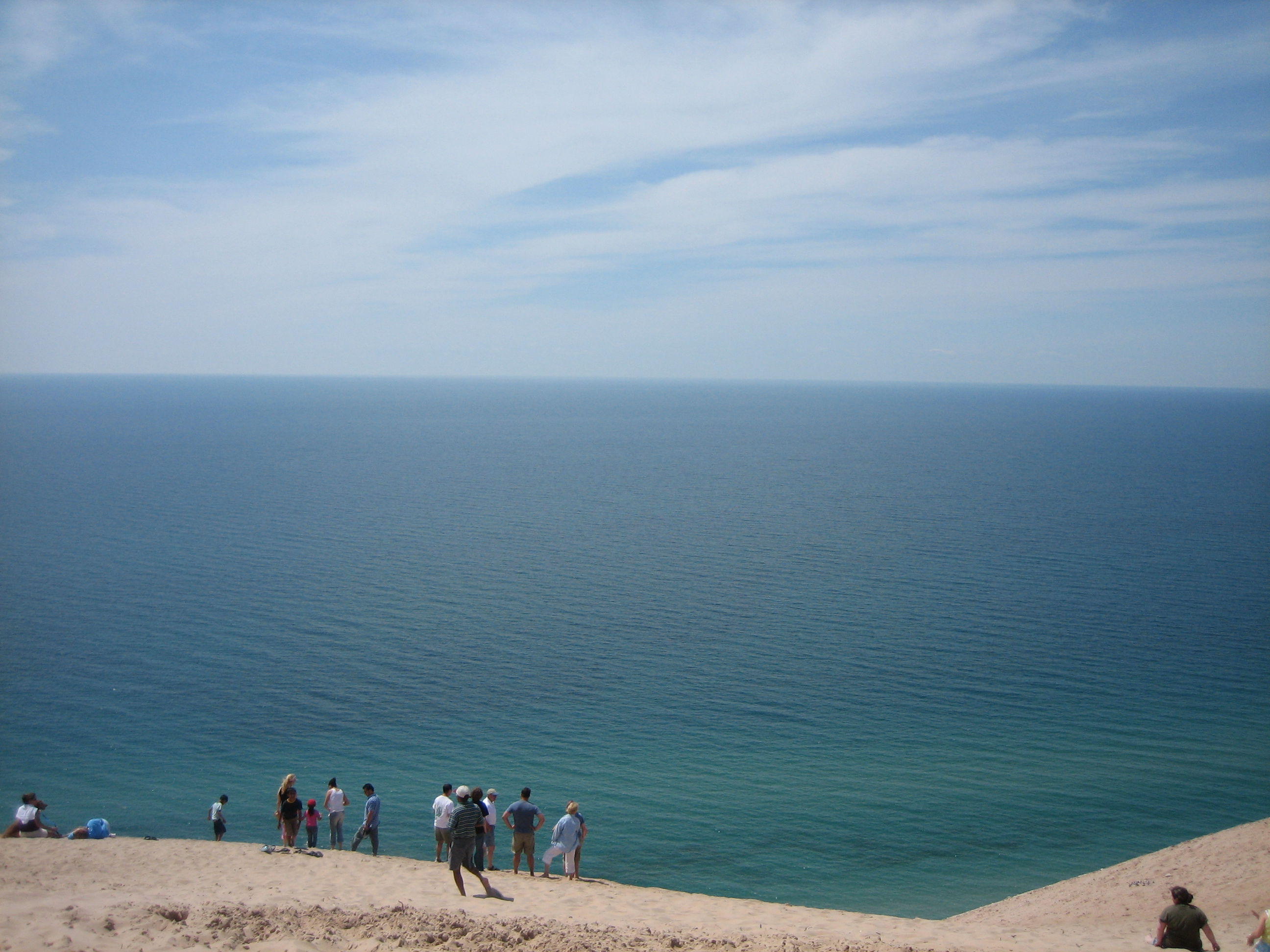 Sleeping Baer Dunes, Michigan, USA